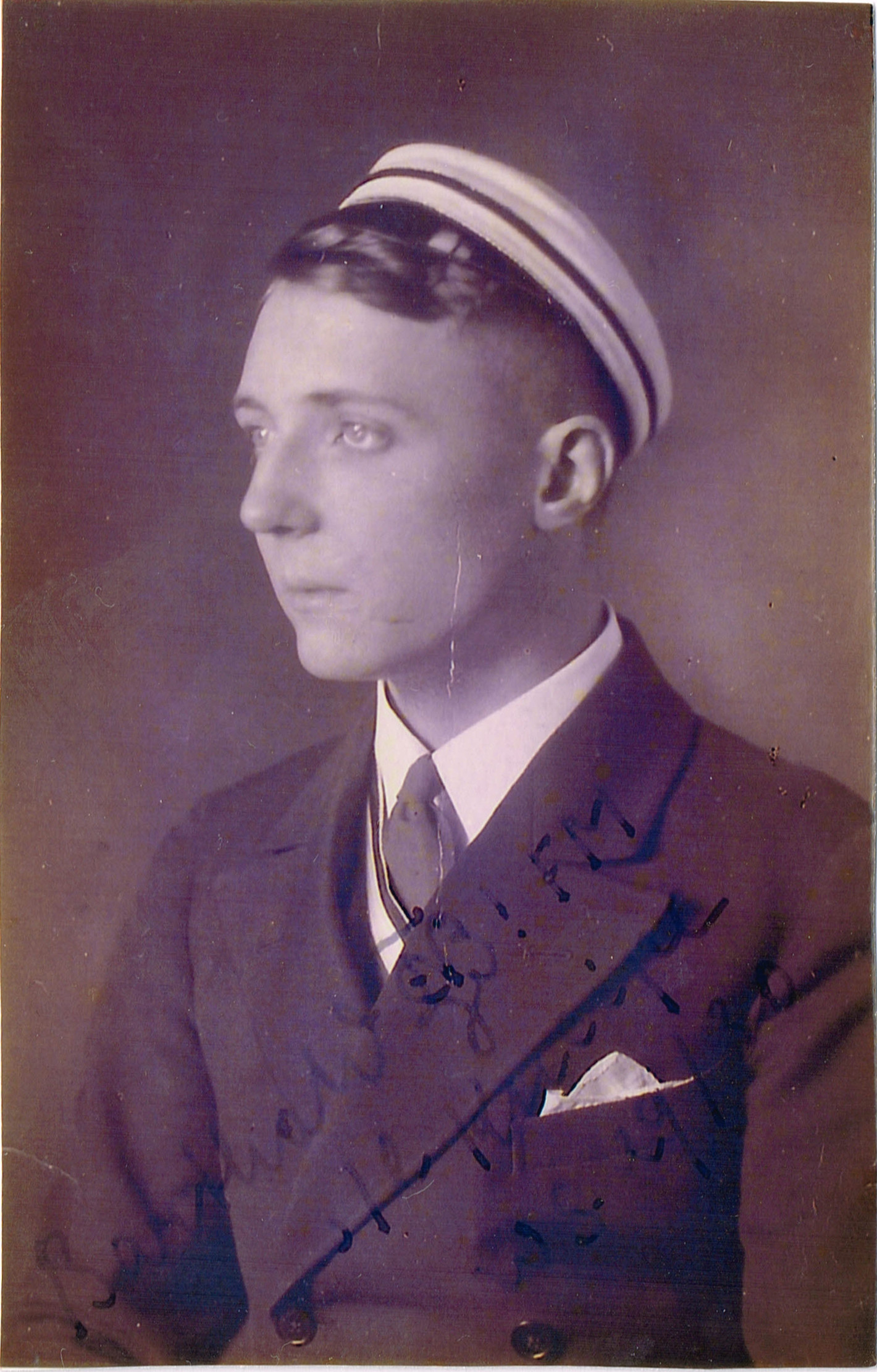 Porträtfotografie des Studenten Werner Barthold